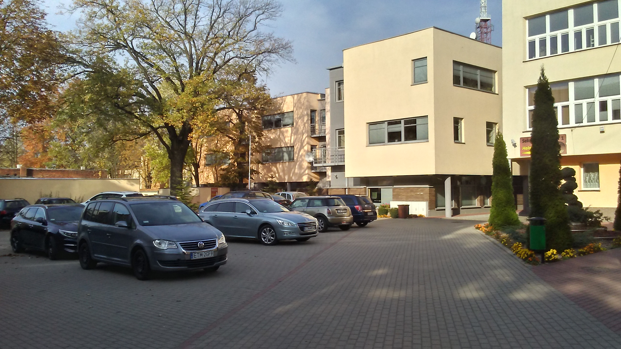 Dziedziniec „Mechanika” - Zespołu Szkół Ponadgimnazjalnych w Tomaszowie Mazowieckim